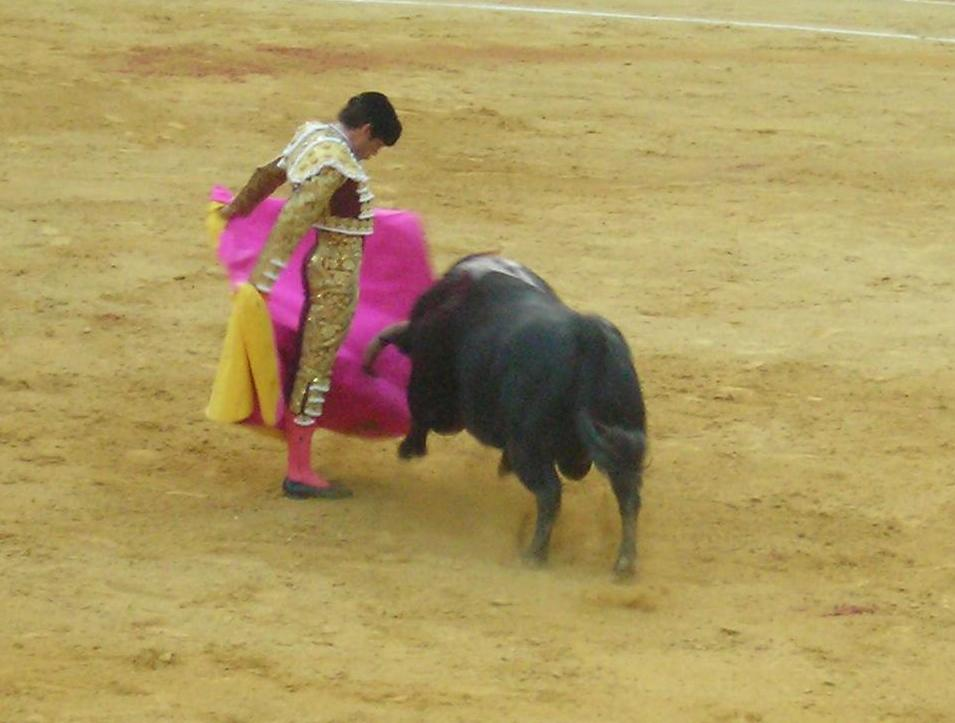 Gaonera de José Tomás en Granada (Feria del Corpus 2009).